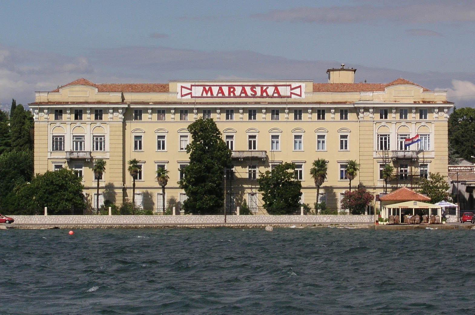 Zadar, Tvornica Maraska, Croatia